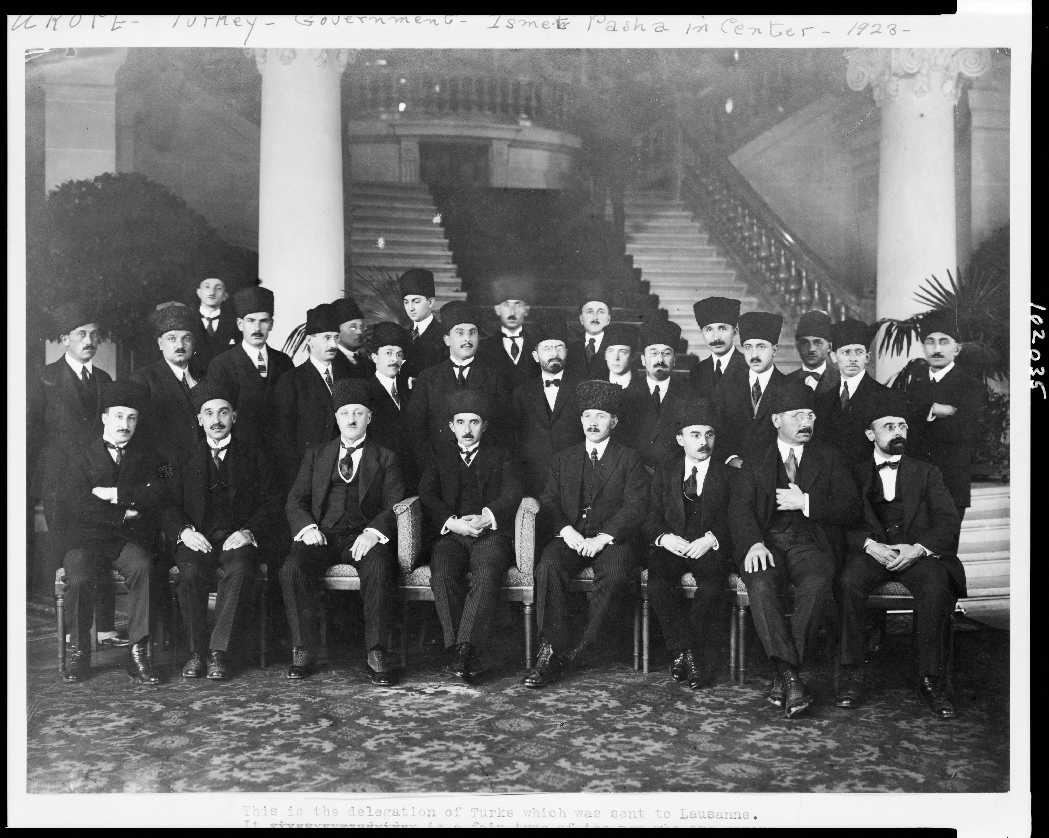 Vertrag_von_Lausanne_Tuerkische_Delegation